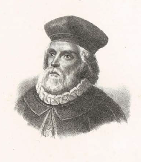 Dal Dizionario biografico degli uomini illustri di Sardegna di Pasquale Tola, 1837